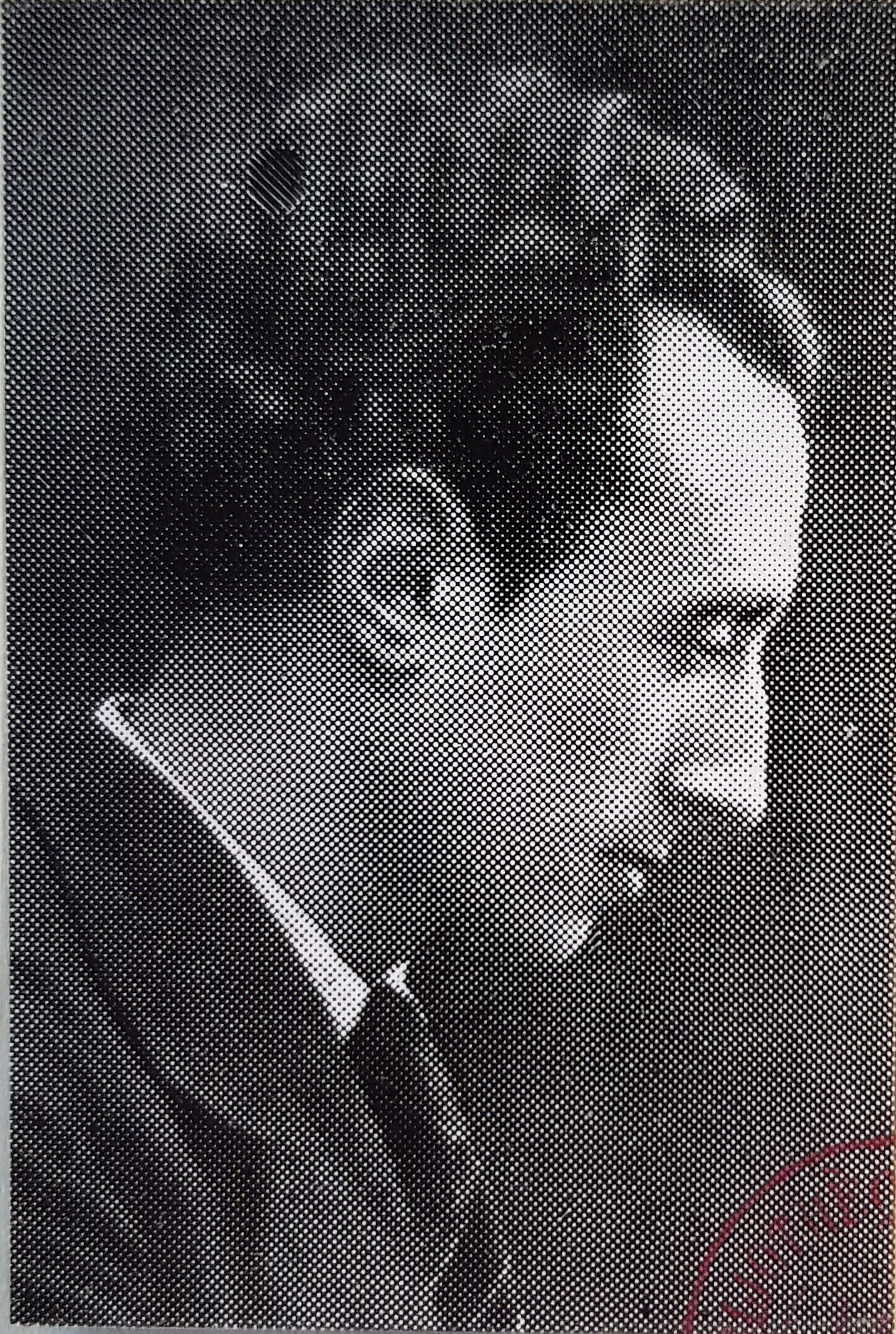 Le peintre nivernais Rex Barrat (1914-1974).